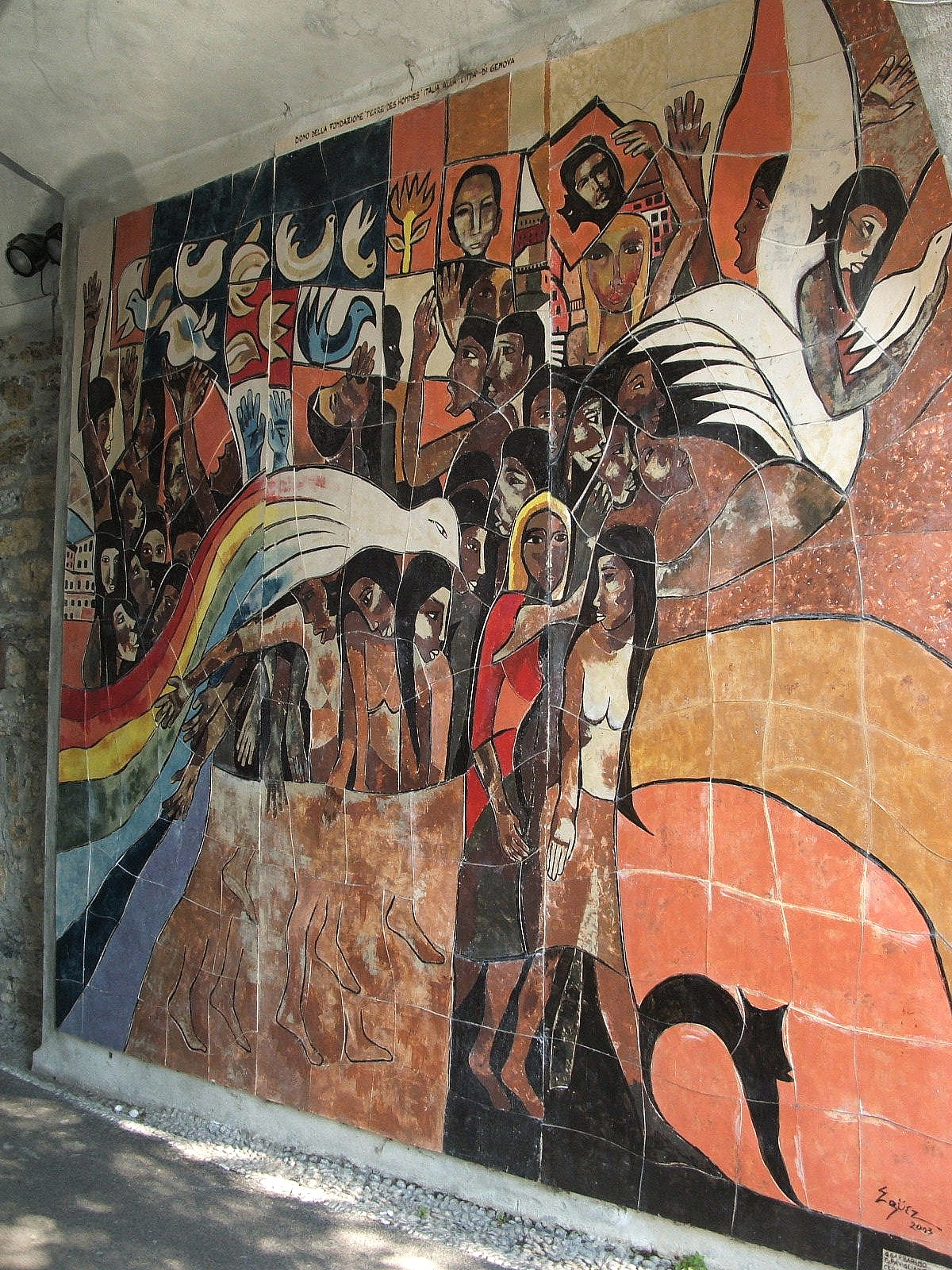 Genova, Castello d'Albertis